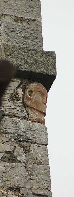 Faccia posta sul campanile di Petricci (Semproniano, GR)all'altezza di 15 mt vista da terra